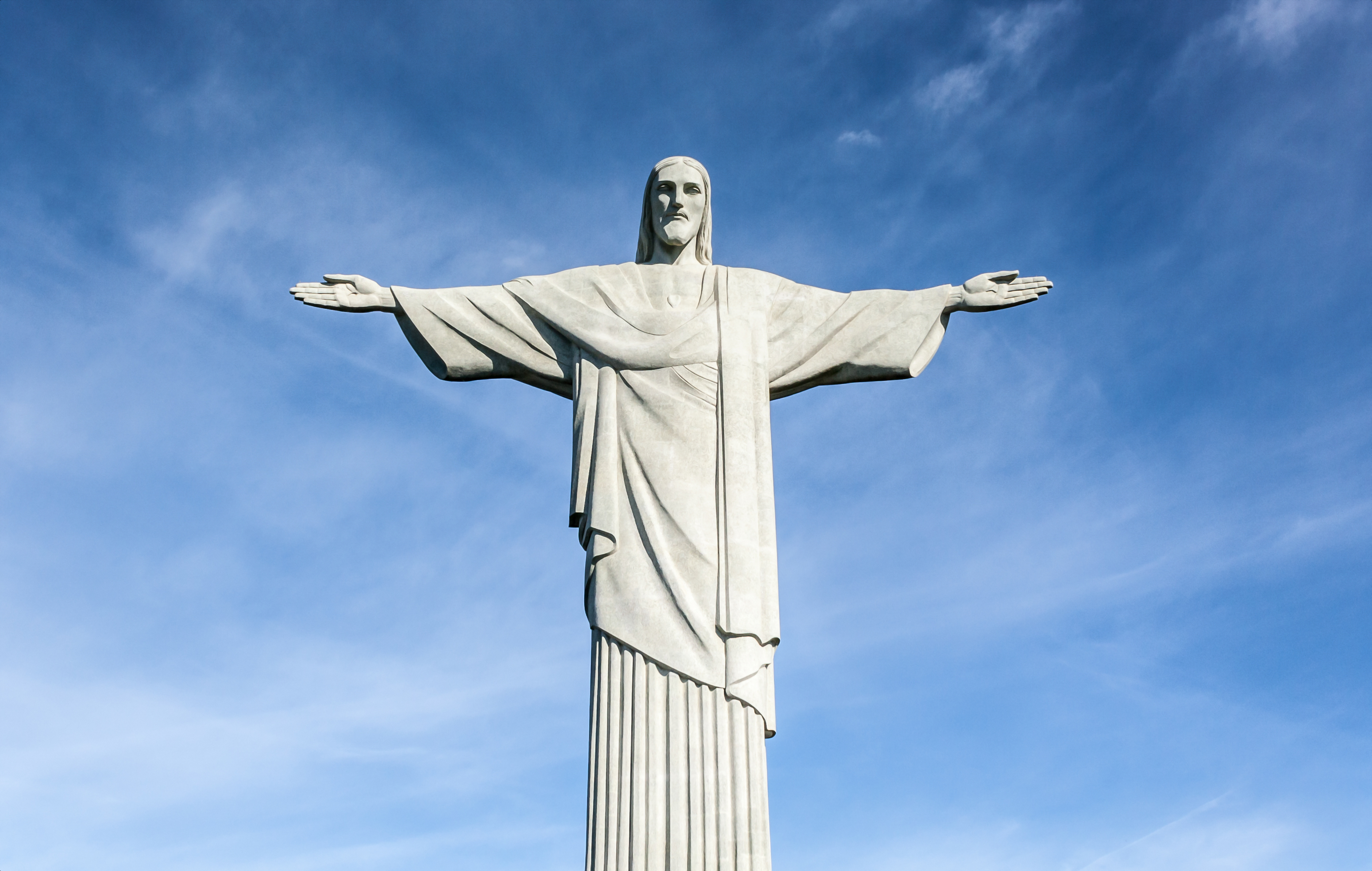 Cristo Redentor, estátua erigida no Penhasco do Corcovado.